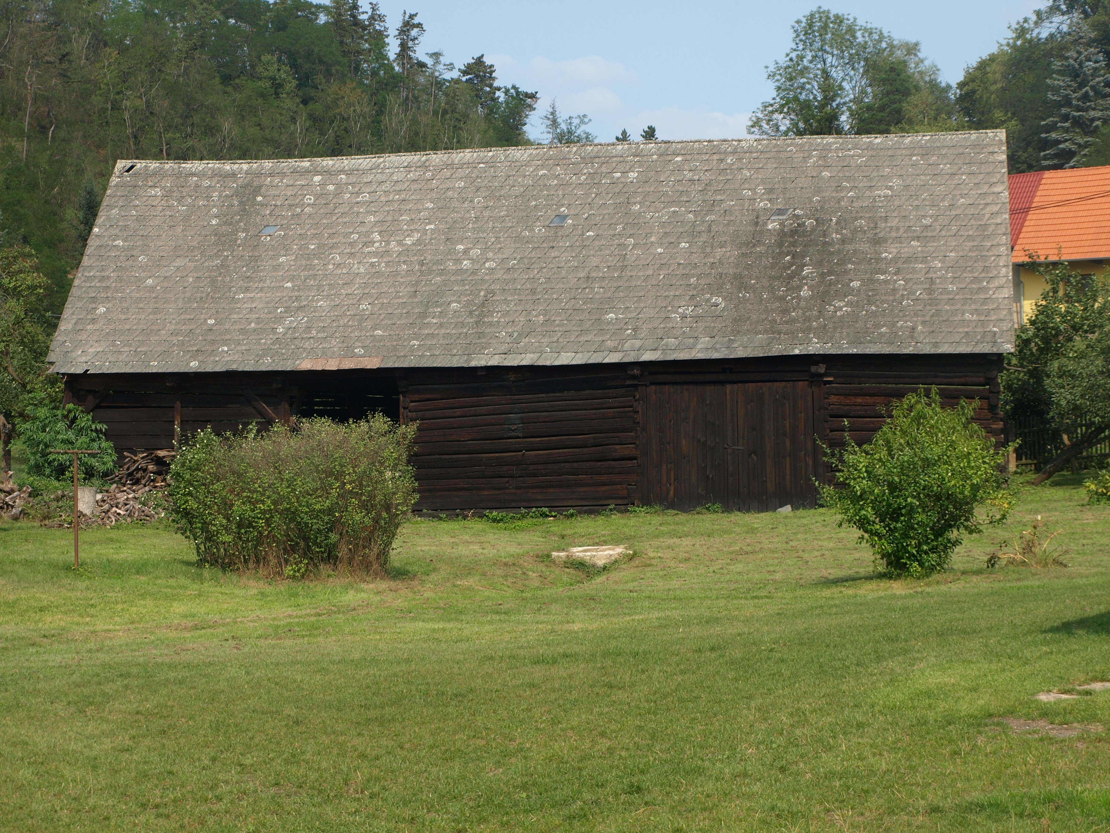 Stodola (Městečko), při čp. 24, Malá Strana, Městečko